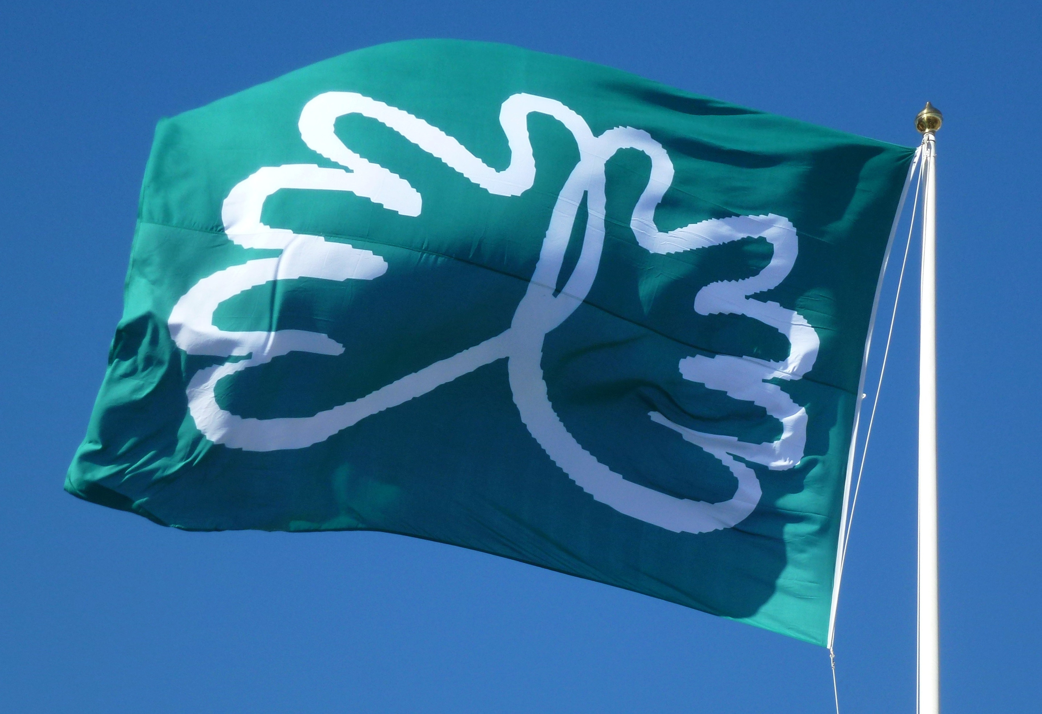 Danderyds sjukhus flagga